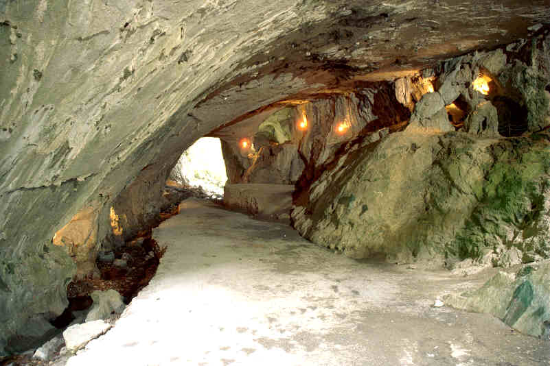 Cueva de Zugarramurdi en la provincia de Navarra, (España). Estas cuevas son famosas por haber acogido durante la Edad Media reuniones de brujas o aquelarres, que dieron lugar a un importante proceso por parte de la Inquisición en el siglo XVII en Logroño que condujo a la hoguera y a la cárcel a numerosas personas de los alrededores.